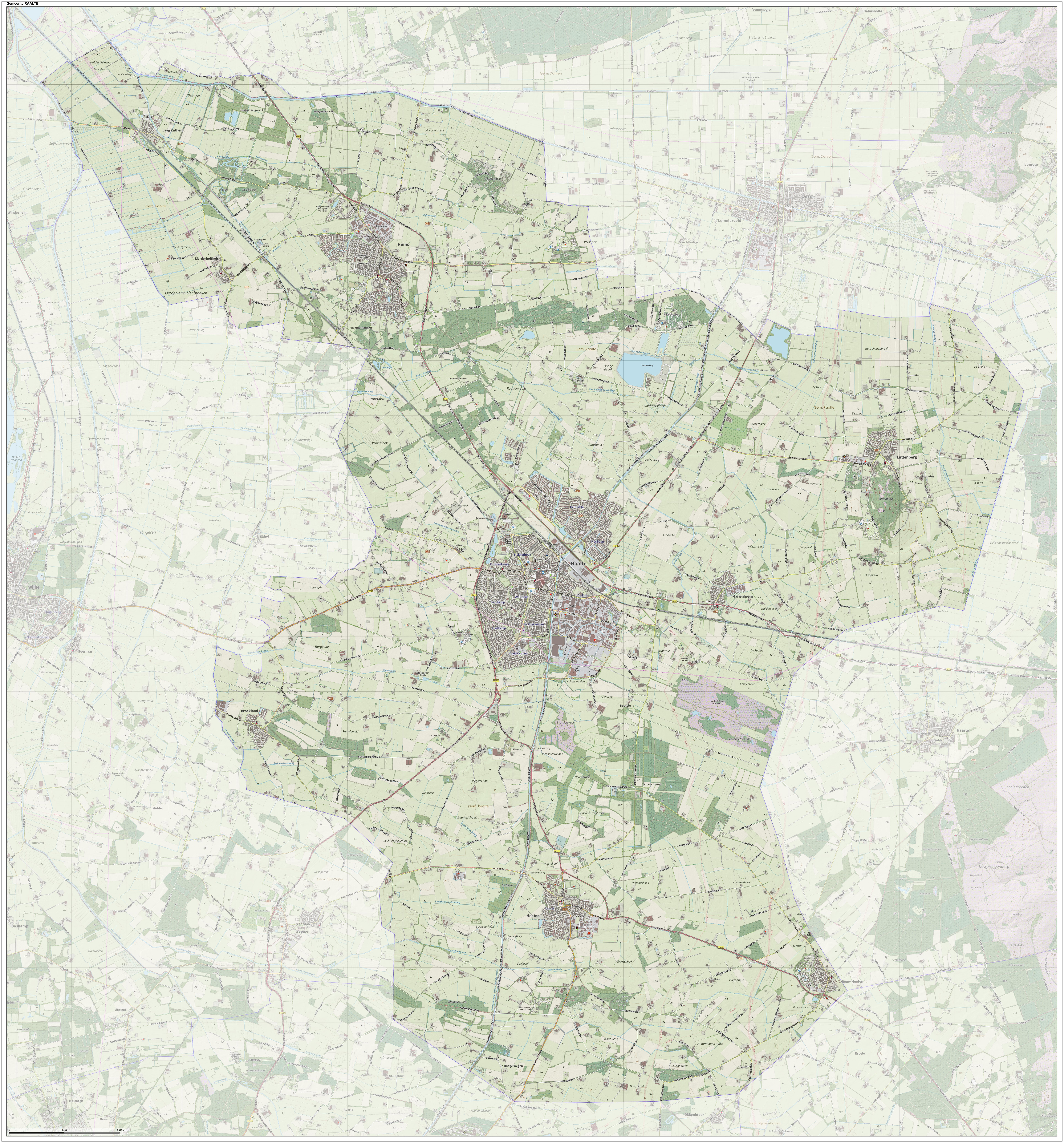 Topografische gemeentekaart. Resolutie: 400 pixels/km. Kaartbeeld samengesteld uit de open geodata van de Top10NL en Top25namen (Kadaster), Creative Commons-BY licentie. Gebouwvlakken uit open geodata BAG extract. Wegen uit de OpenStreetMap, OpenStreetMap community. Reliëfschaduw uit de Actuele Hoogtekaart AHN2. Samenstelling en kleurenschema: Jan-Willem van Aalst, met QGIS. Zie ook de Legenda.